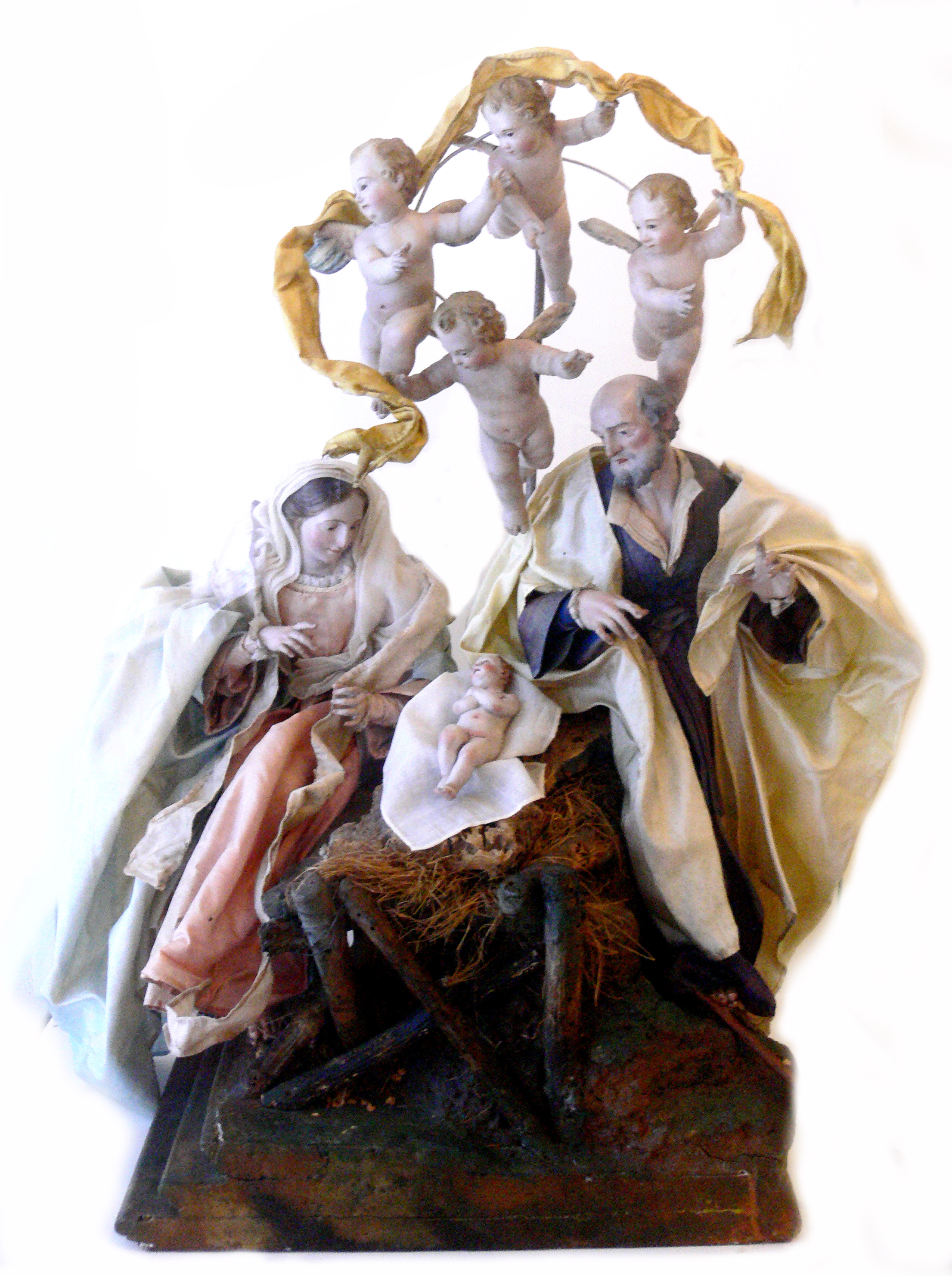 Heilige Familie mit Putten, Neapel, Mitte 18. Jh. (Terracotta, Holz, Drahtgeflecht, Werg, Seide) Landesmuseum Württemberg (Außenstelle Museum für Volkskultur in Württemberg, Waldenbuch)